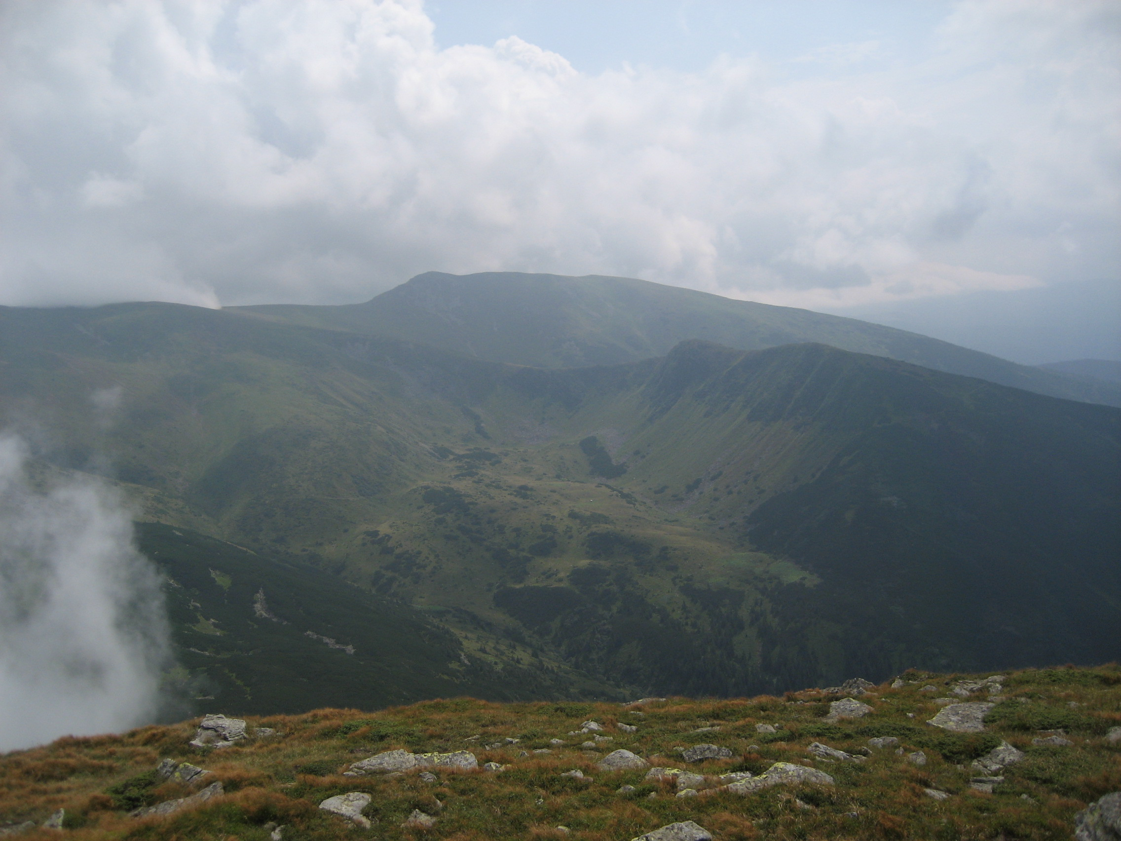 гора Гутин Томнатик